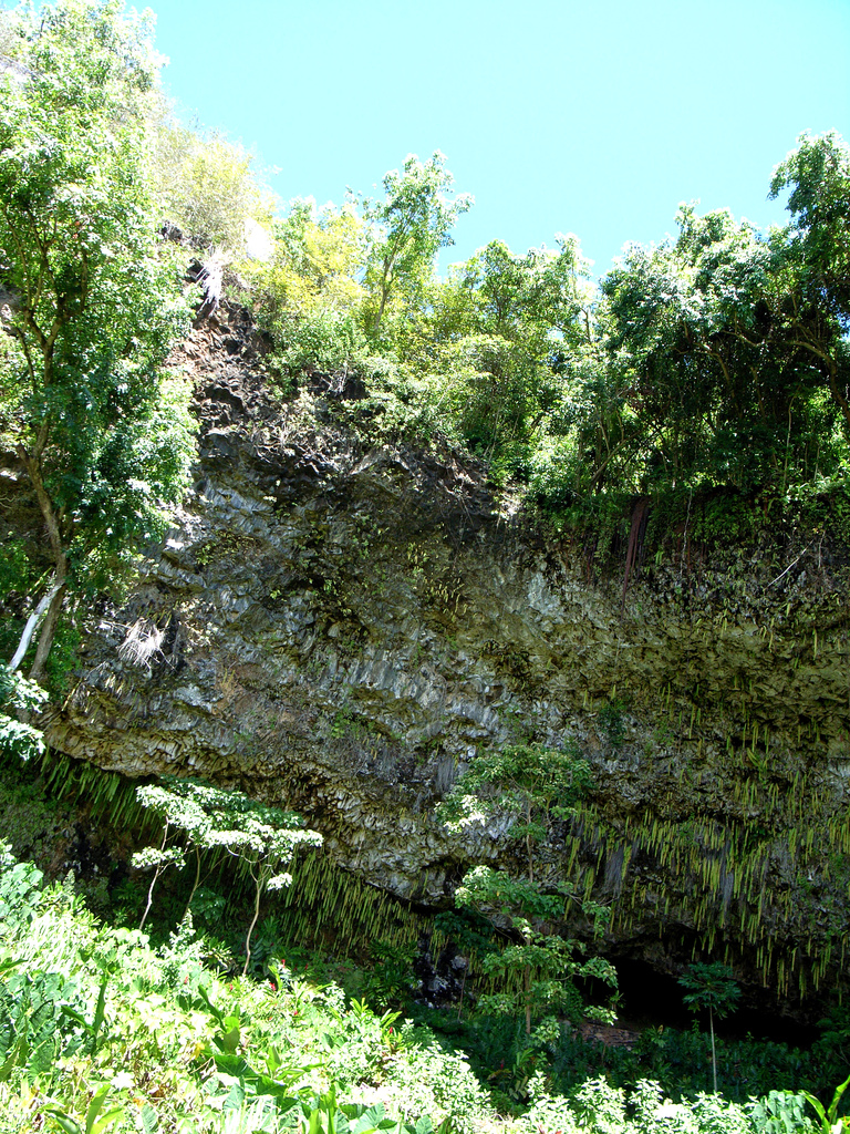 Fern Grotto, Kauai, HI